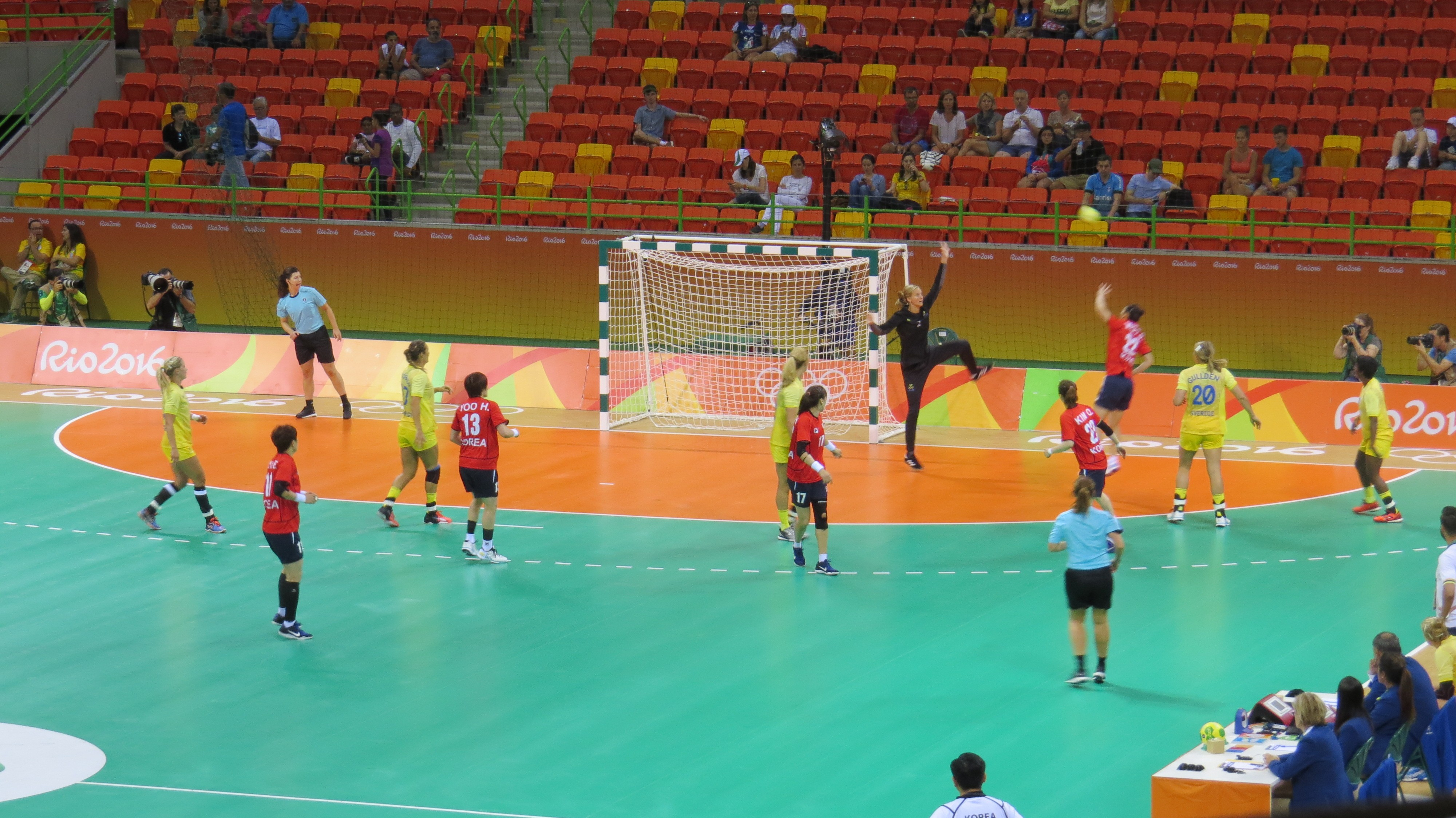 Rio 2016. sx 01